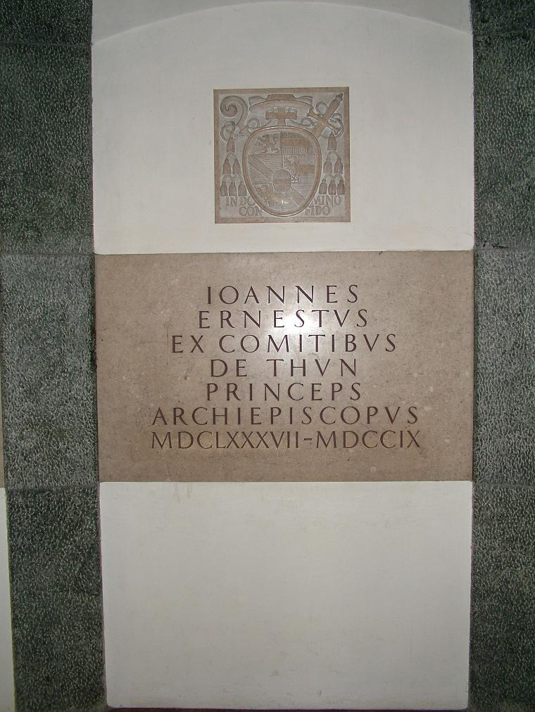 Grab Erzbischof Johann Thun in Salzburg